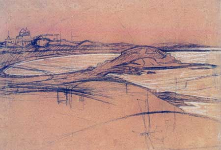 Sea side/Bord de mer